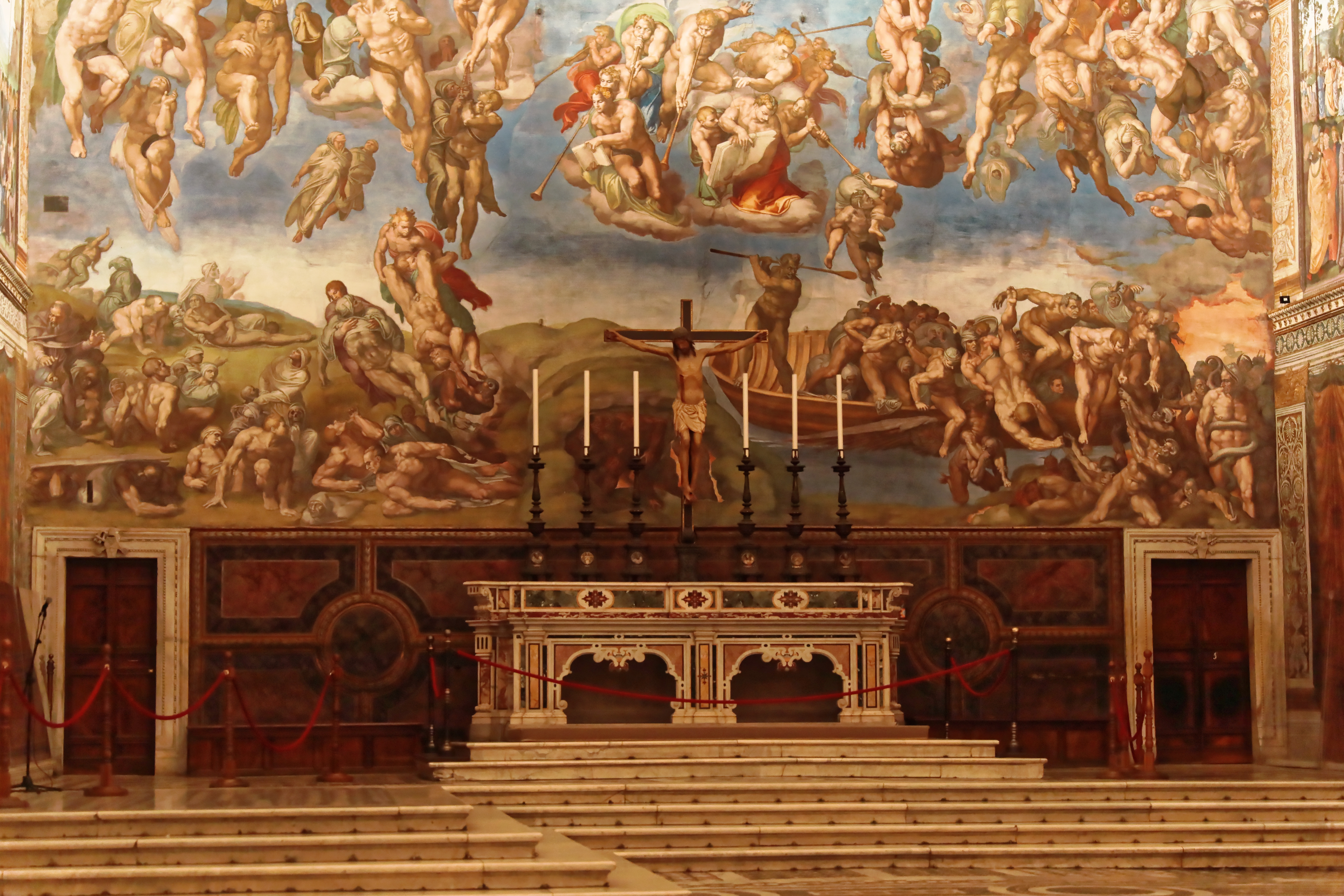 Alterraum in der Totalen mit Treppen im Vordergrund, dahinter der untere Teil des Jüngsten Gerichts